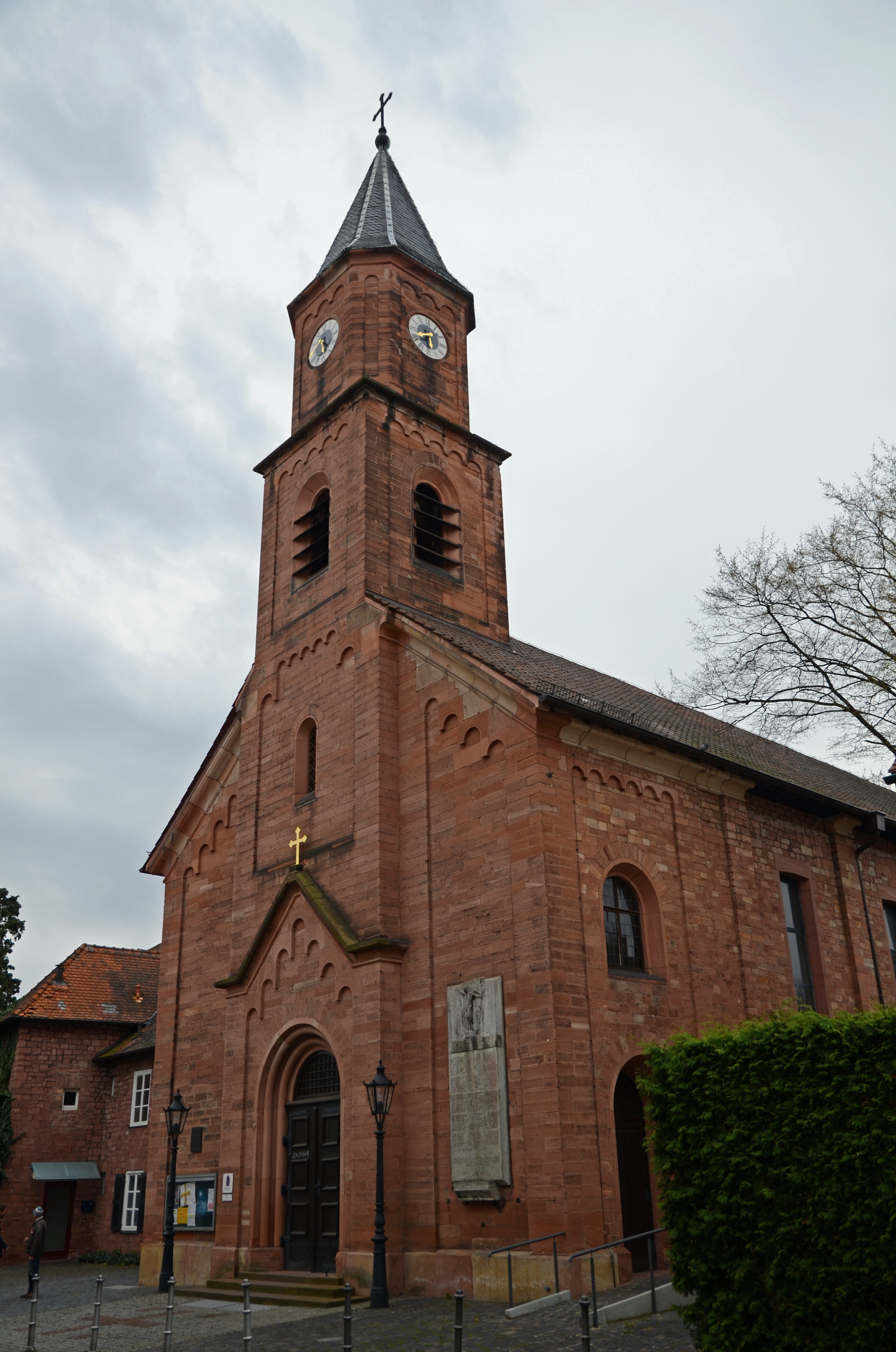 evang.-luth. Christuskirche in Aschaffenburg